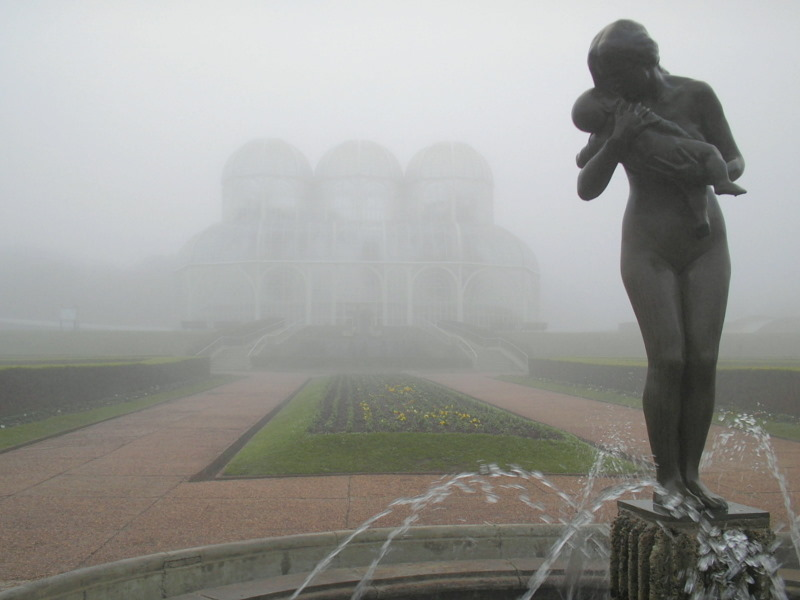 Escultura "Amor Materno", de Zaco Paraná, localizada no Jardim Botânico de Curitiba, Paraná, Sul do Brasil. Manhã de geada, com muita neblina.